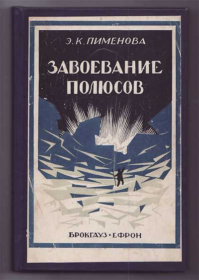 Пименова Эмилия. "Завоевание полюсов"